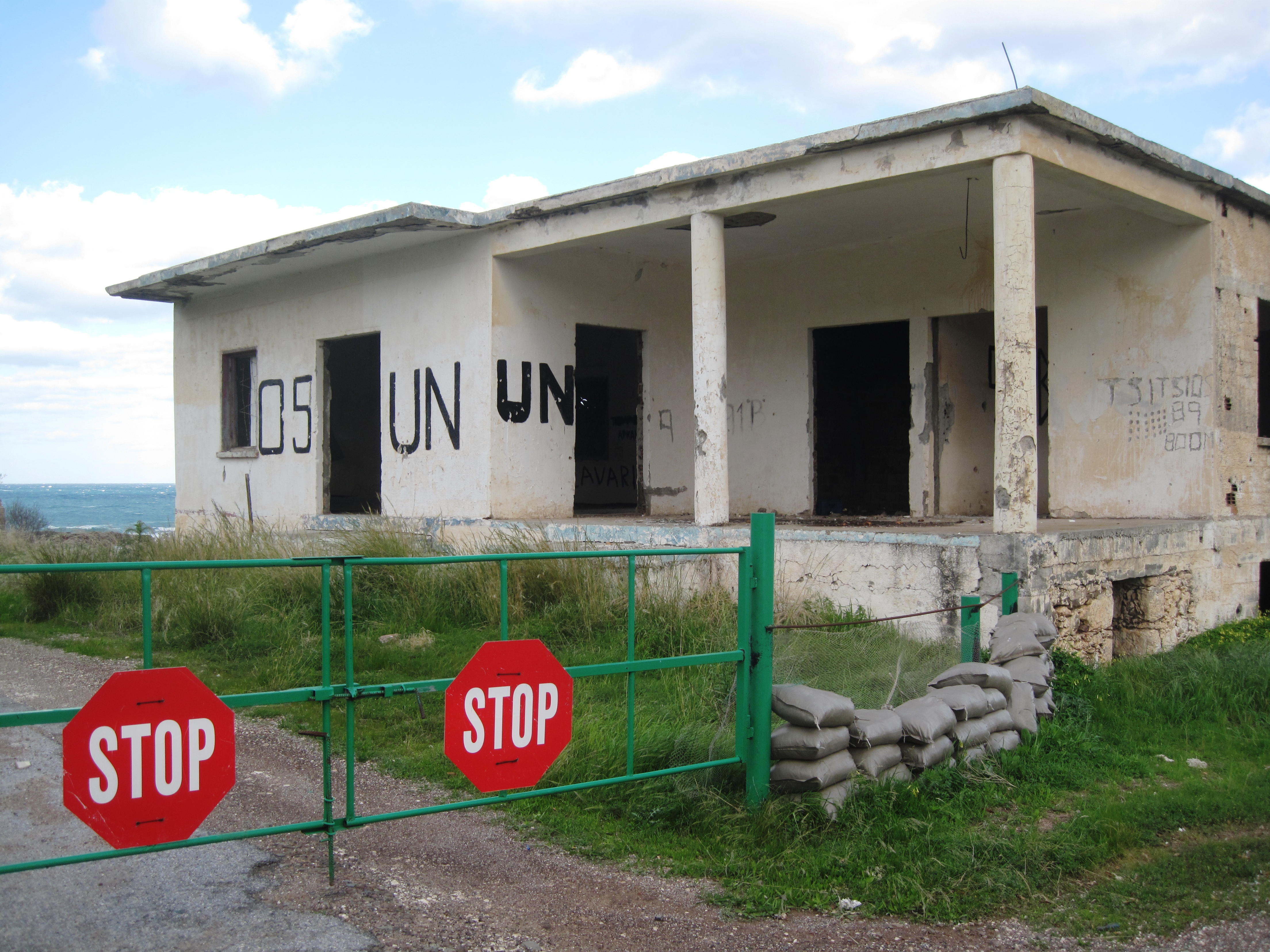 kokkina